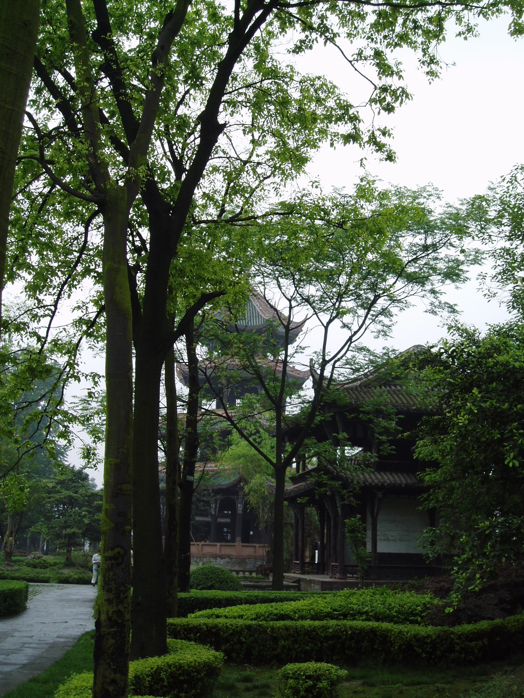 雨中的zh:望江楼，由本本一世拍摄于2004年9月